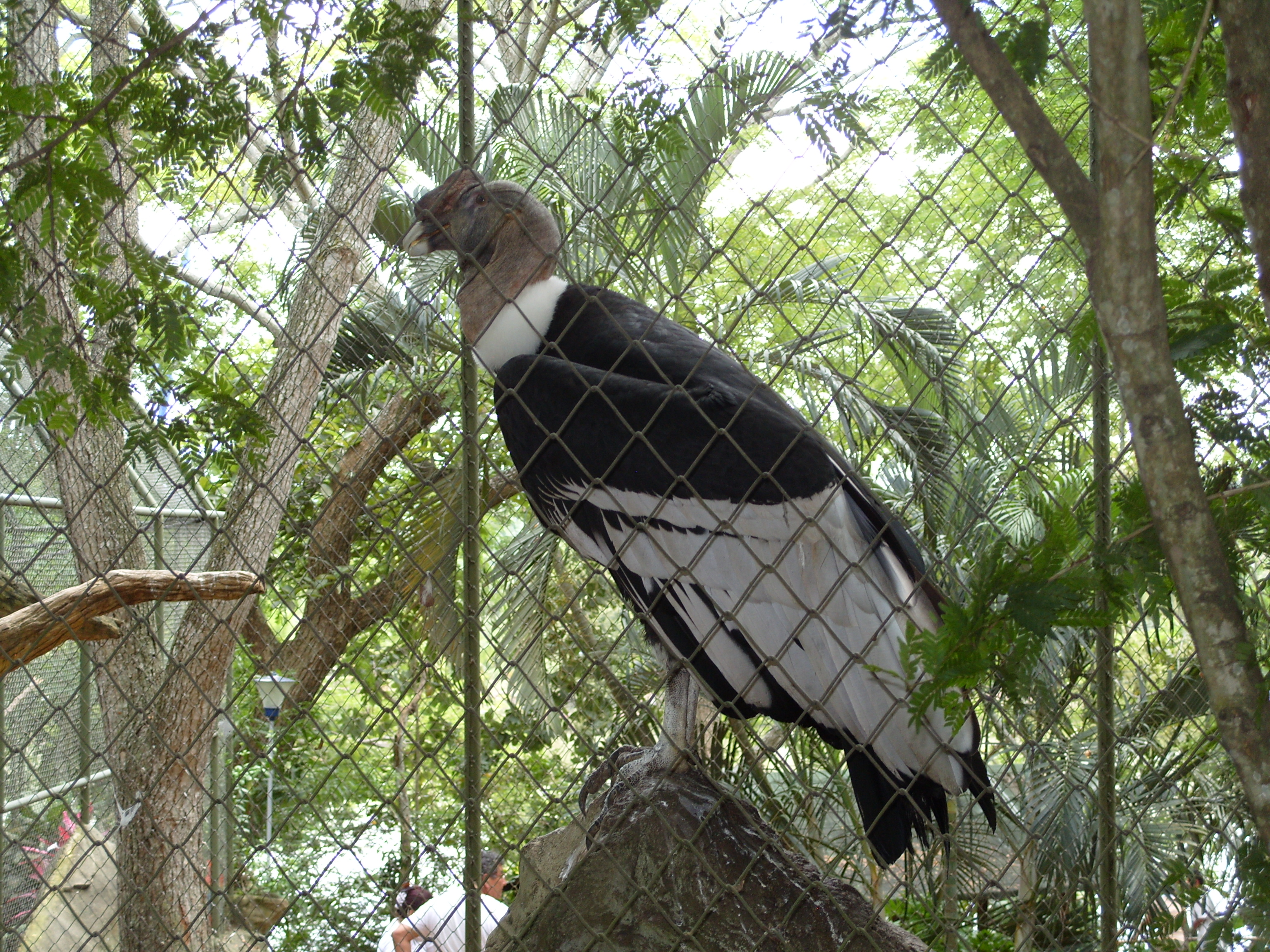 Cóndor en Cautiverio